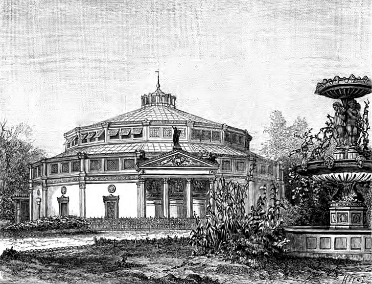 Gravure représentant le Cirque d'été aux Champs-Élysées, au XIXe siècle, qui pouvait contenir jusqu'à 3500 places.